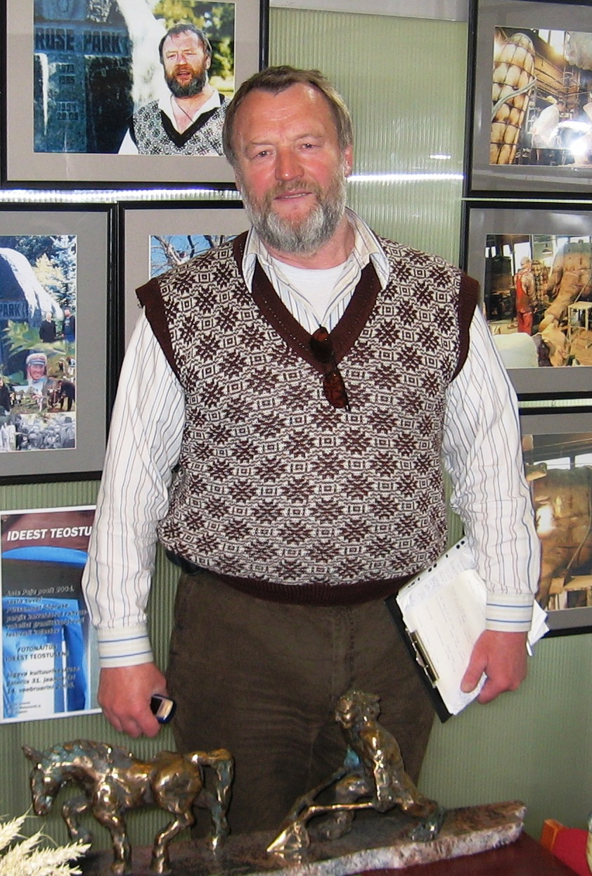 Ants Paju